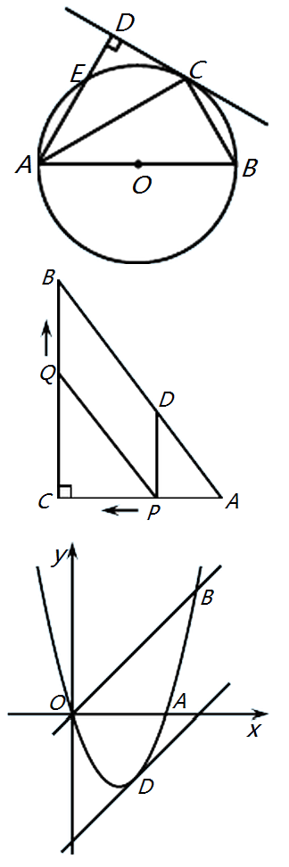 二零一二年福州中考数学倒数三题配图